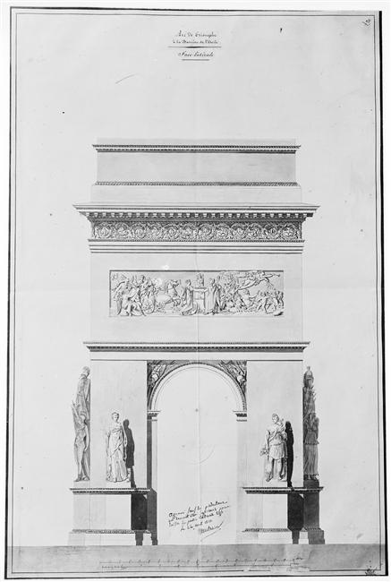 Projet d'arc de triomphe à la barrière de l'Étoile